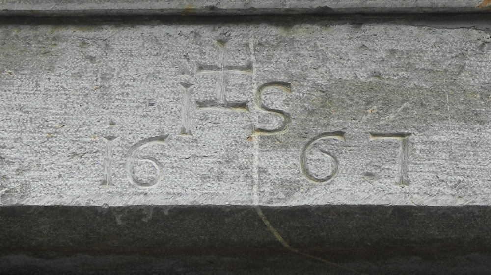 Gorno, Chiesa della Madonna delle Grazie - Data incisa nell'architrave di pietra del portone laterale.